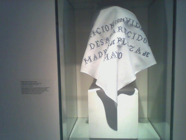 Ha sido y es símbolo del reclamo de las Madres